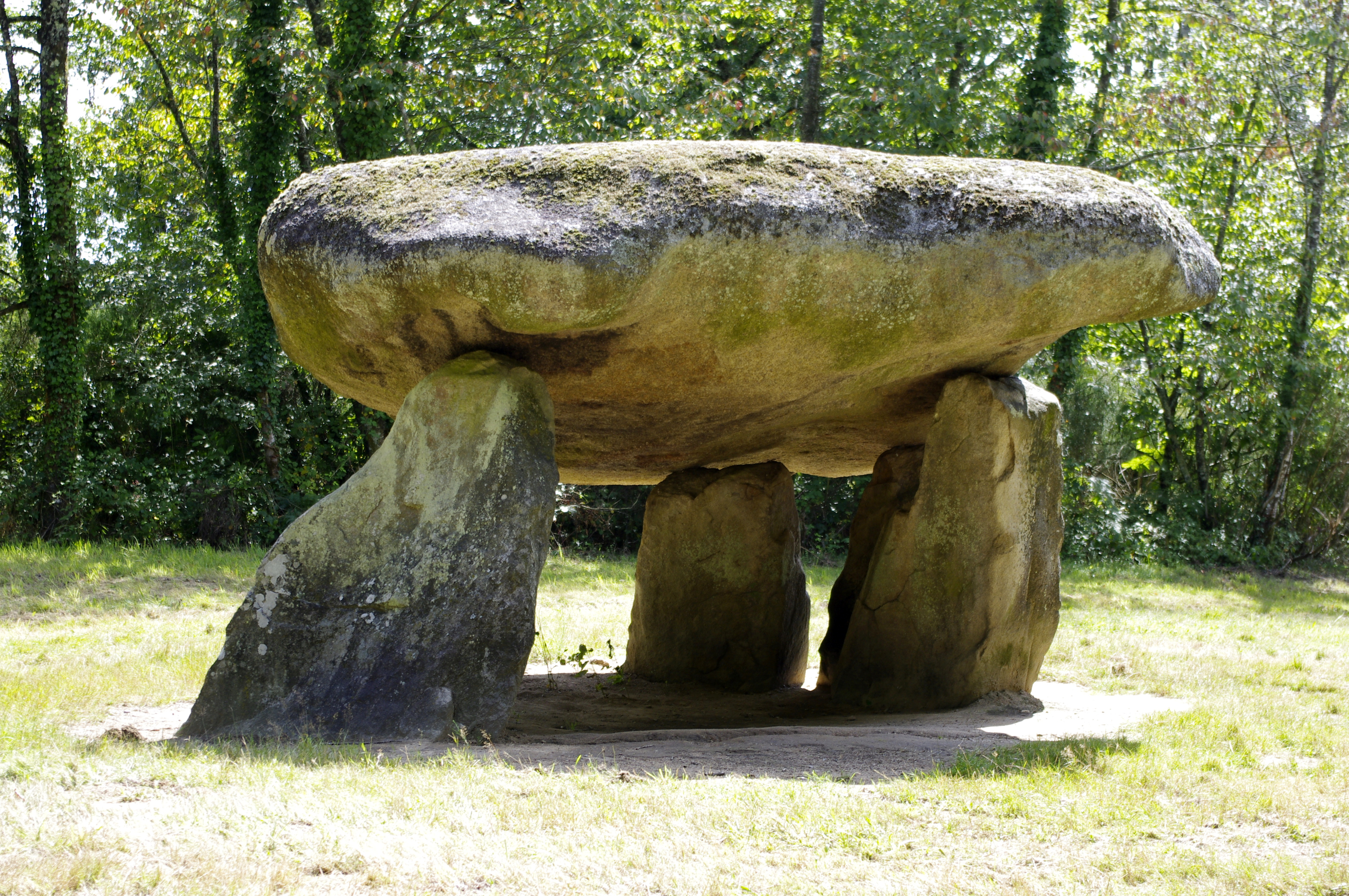 Dolmen de Chez Moutaud, commune de Saint Auvent, Haute Vienne